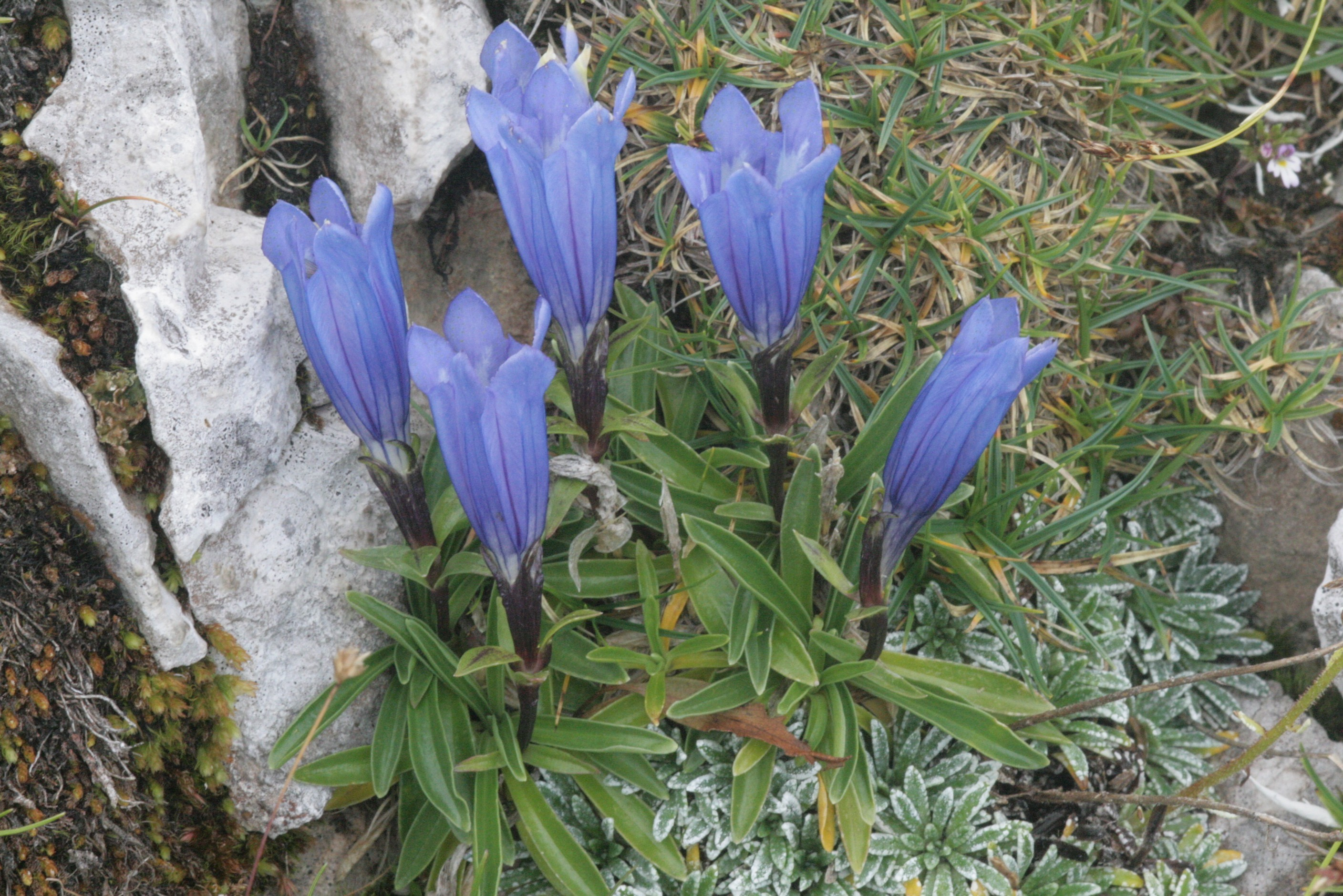 Gentiana froelichii (Karawanken-Enzian) Aufnahmestandort: Hochobir, Kärnten, Austria